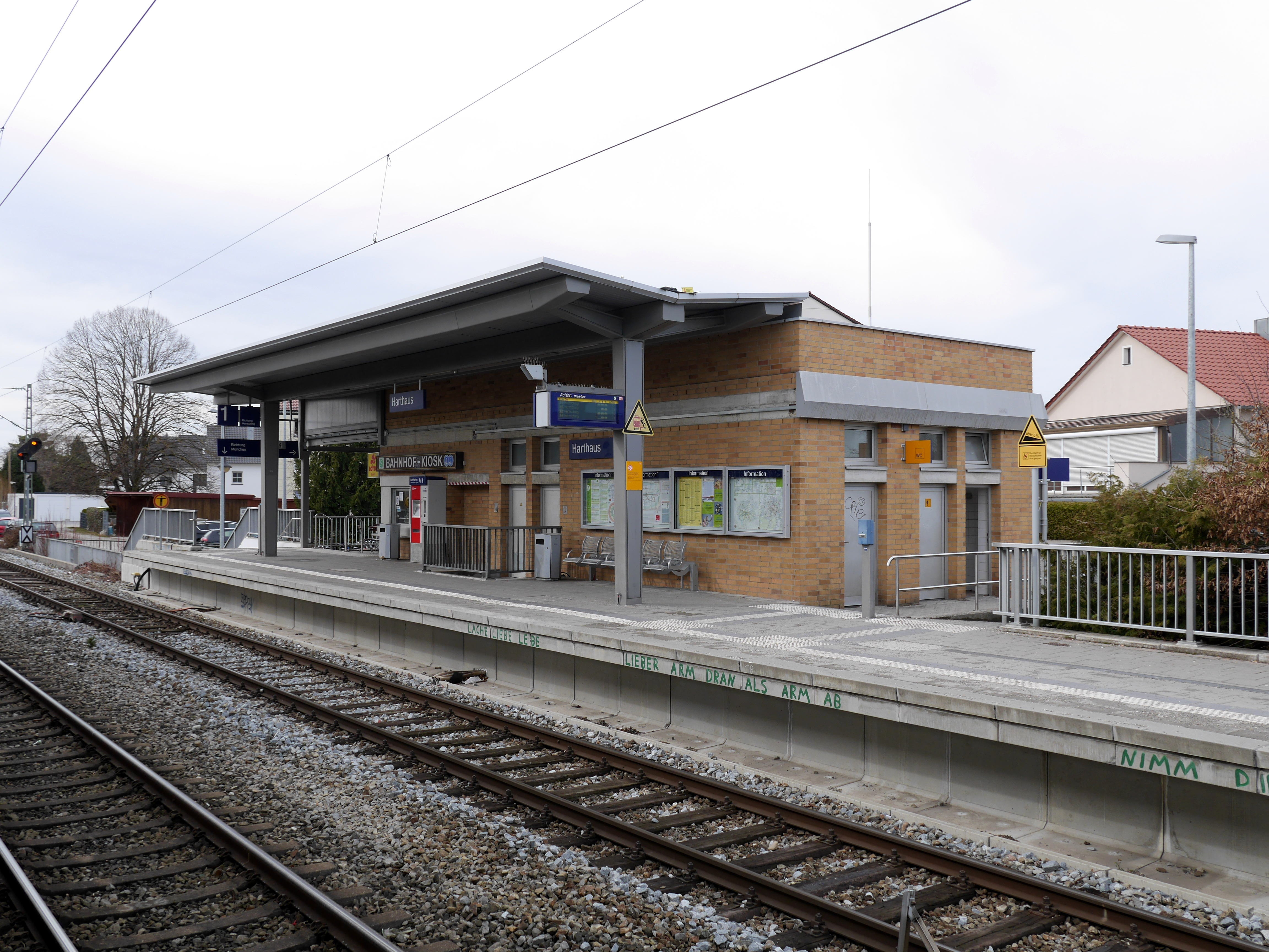 Stationsgebäude des Haltepunkts Harthaus von der Gleisseite